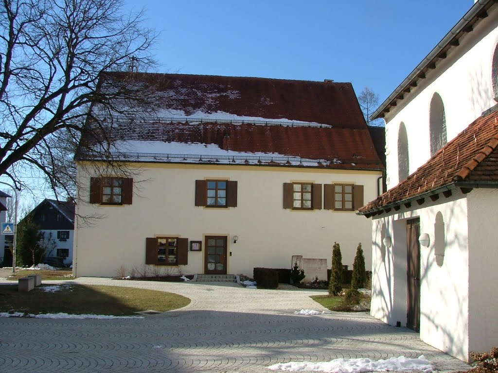 Pfarrhaus